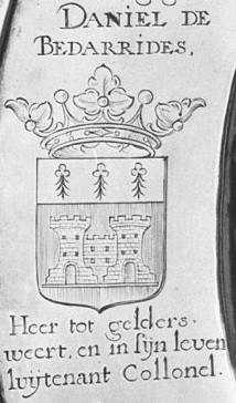 Wapen van Daniel de Bedarrides, heer van Geldersweert.